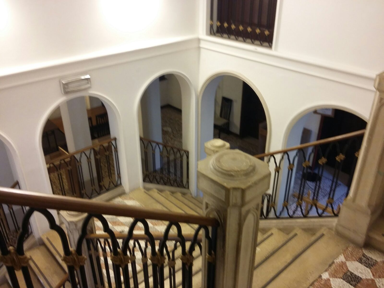 Cordovado, Palazzo Cecchini: scala interna del palazzo.